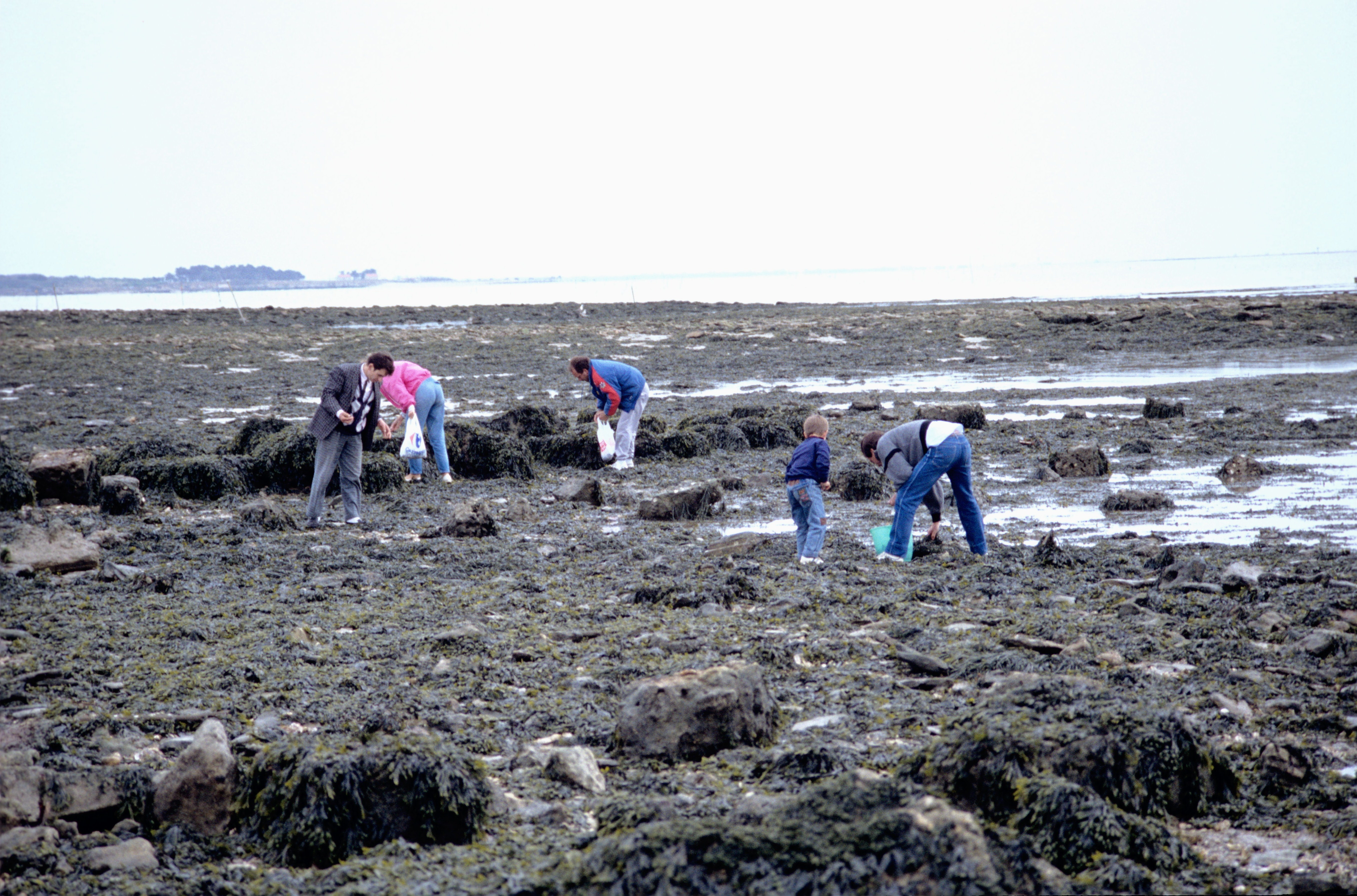 Ces pêcheurs à pied pratiquent la pêche de loisir sur le platier rocheux. Ils ramassent principalement des petits crustacés (crâbes, crevettes) et des mollusques (bigorneaux, huitres et moules sauvages entre autres). Pointe de La Fumée, Fouras, Charente Maritime, France.